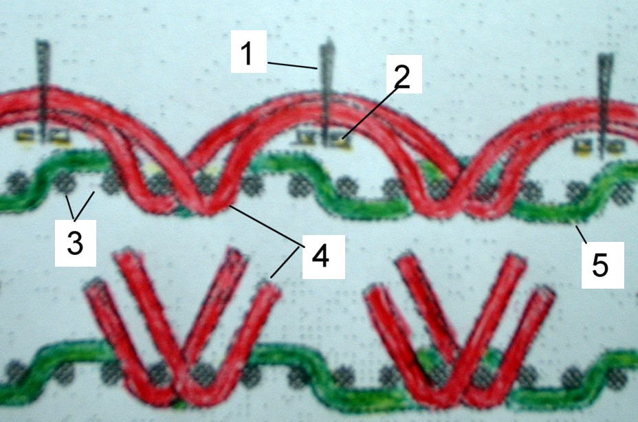 Schema: Cordsamt-Kettschnitt